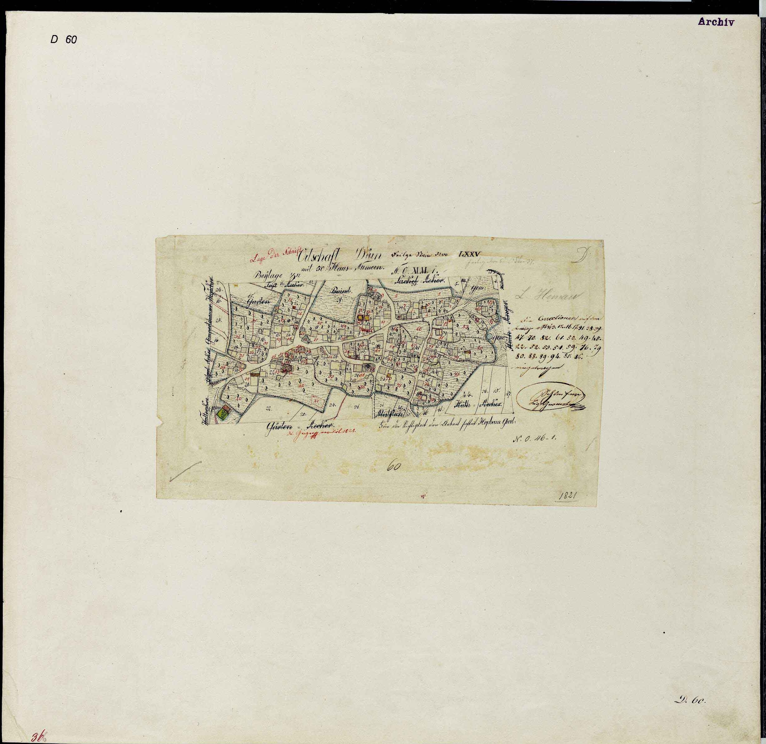 Ortsblatt des Königreichs Bayern: Dürn Kreis Neumarkt Oberpfalz 1821